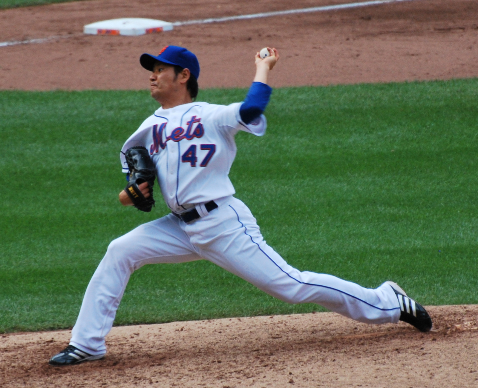 Hisanori Takahashi